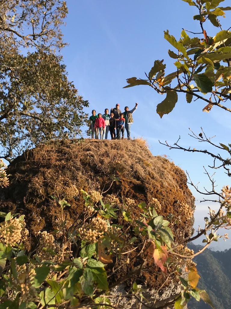 Cerro de "El Peñon" entre el ejido de La cañada y El Rosario en el Mpio. de Ayutla, Jalisco